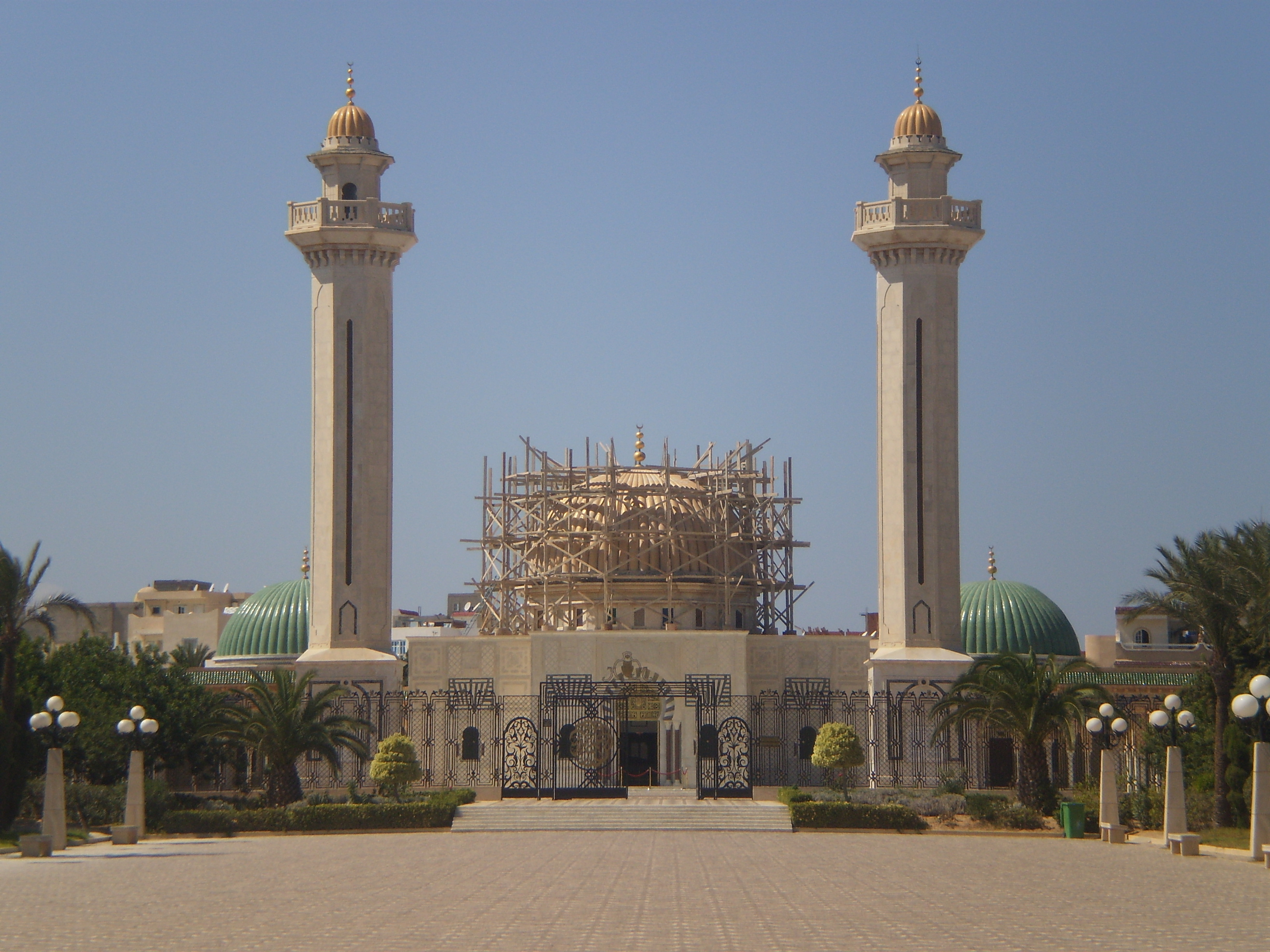 Mauzolej Habiba Burgibe